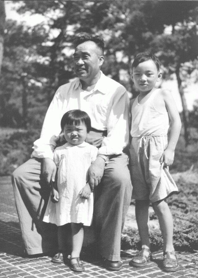 1949年，朱德和小二、妞妞在香山